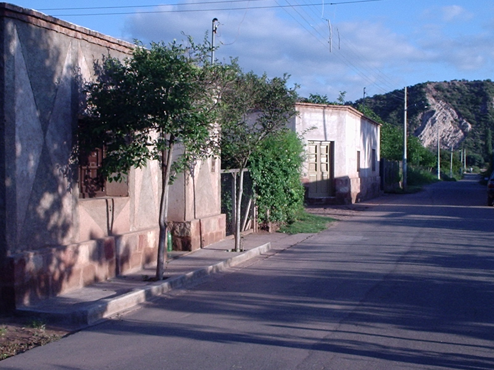 Calle principal de Santo Domingo, Prov. de La Rioja.